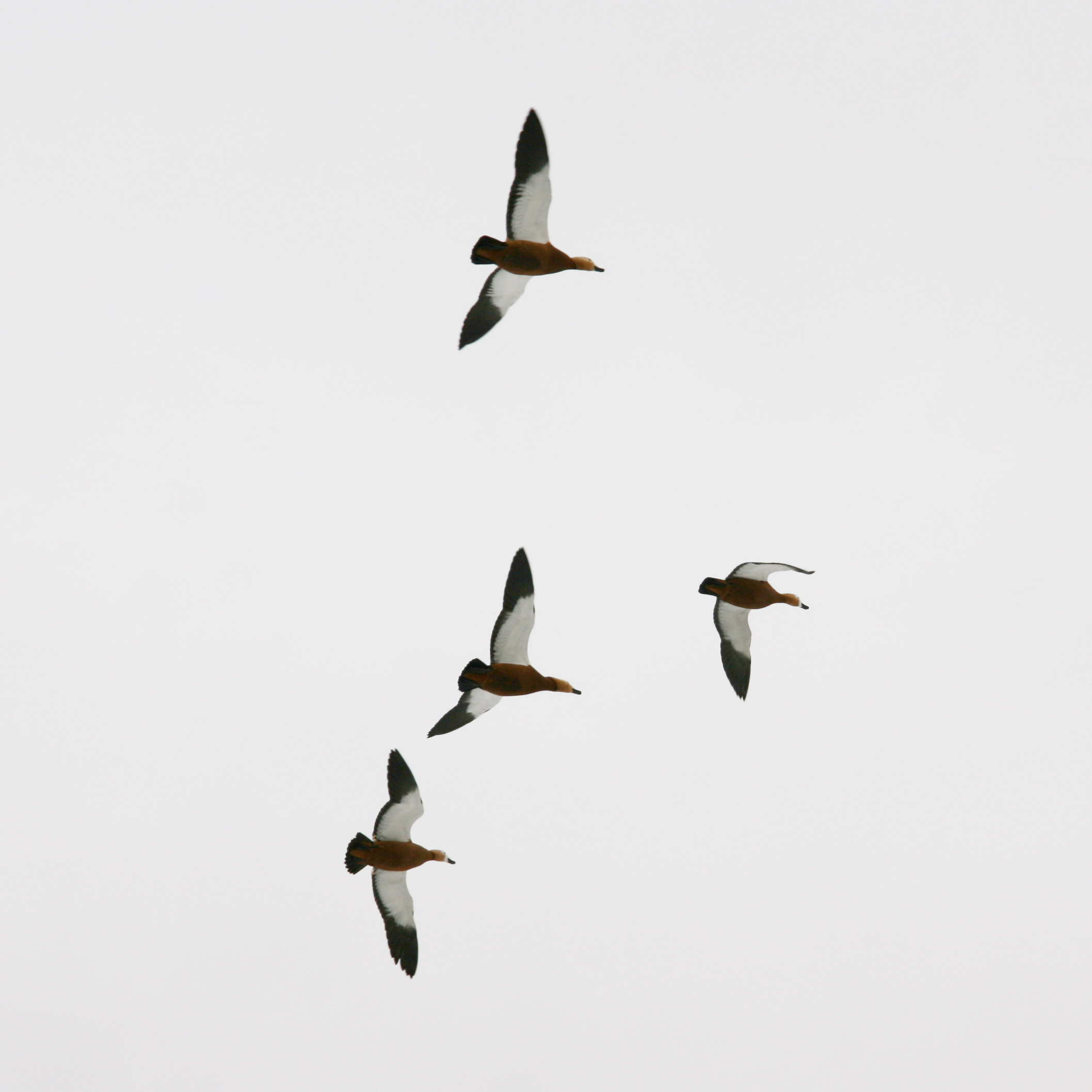 Огарь в полете